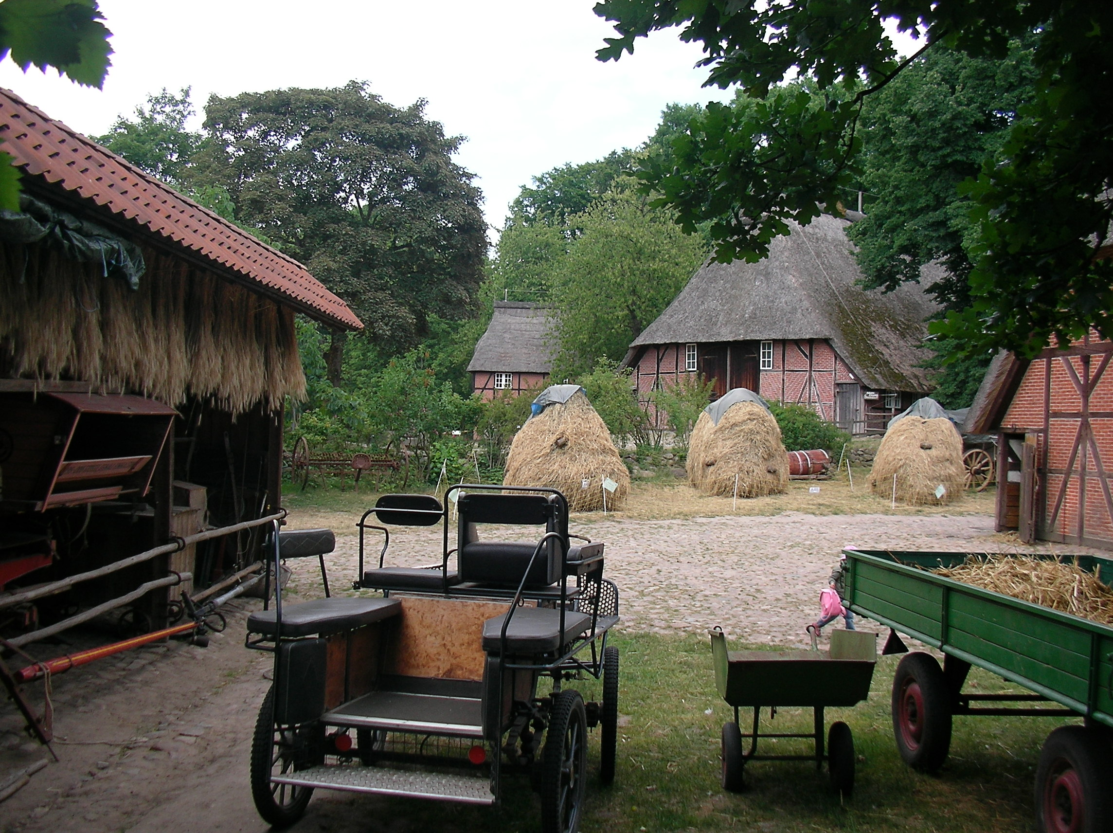 Hamburger Stadtteil Volksdorf; das Freilichtmuseum Museumsdorf Volksdorf Im Alten Dorfe vom Eulenkrugpfad aus; das Museumsdorf zeigt das bäuerliche Leben in den Walddörfern aus vergangenen Zeiten; mit integriertem Streichelzoo (Bauernhoftiere) This is a photograph of an architectural monument.